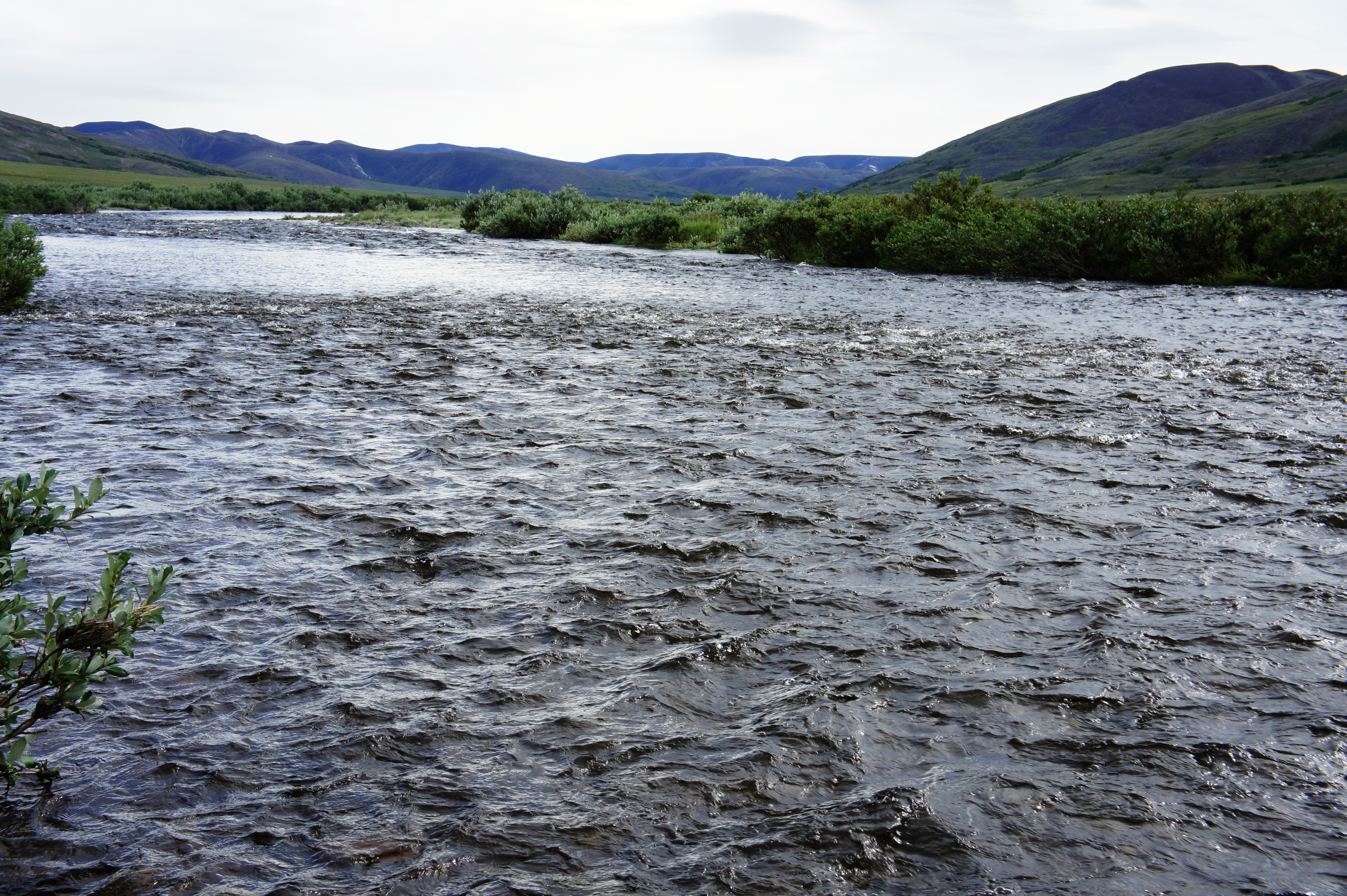 Умкынейвеем